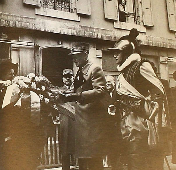 Le général Guisan à Saint-Gervais, décembre 1952. Photographié par Maurice Wassermann